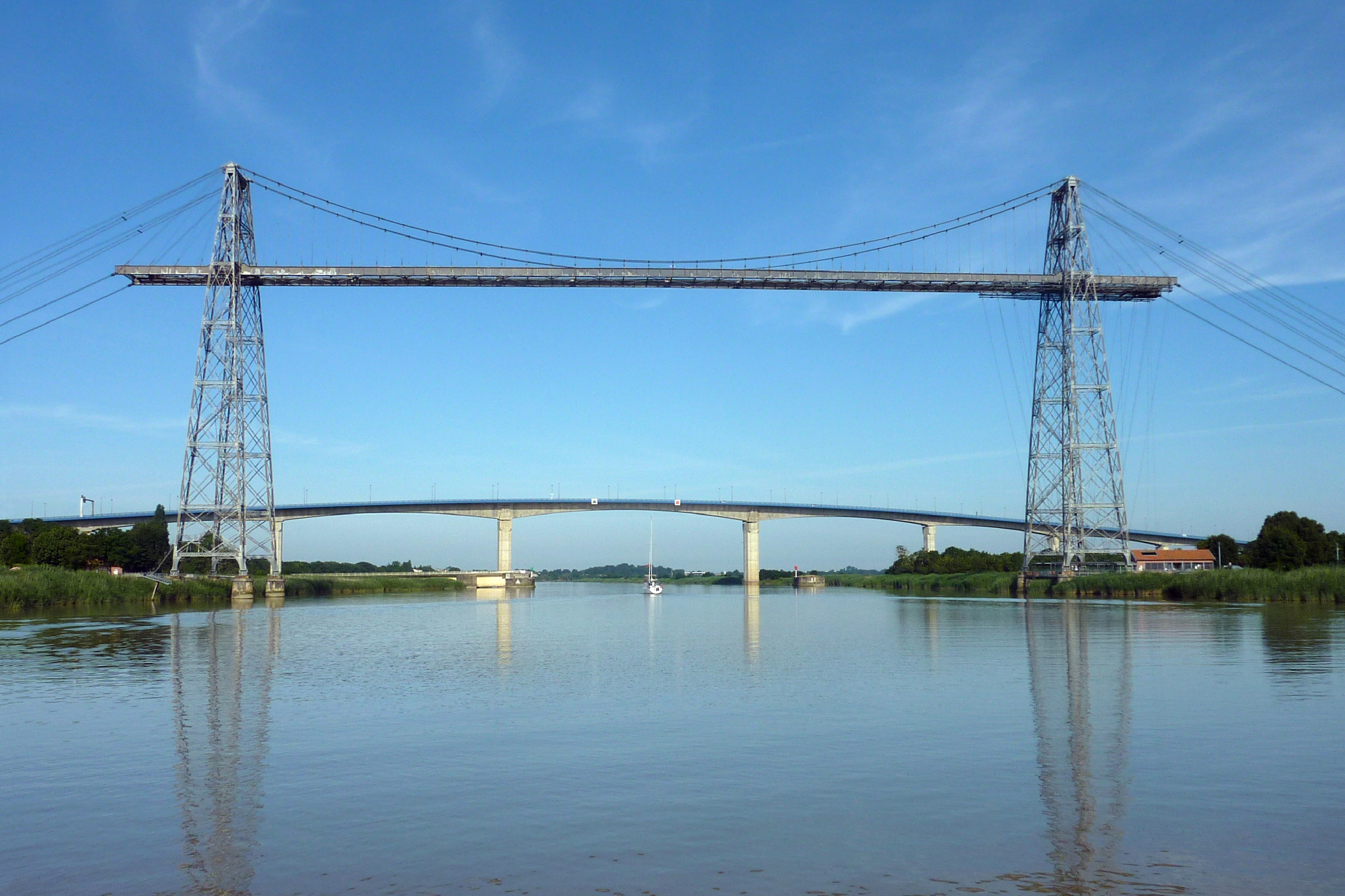 Pont transbordeur et viaduc de Martrou Rochefort Charente-Maritime France; vue vers l'aval